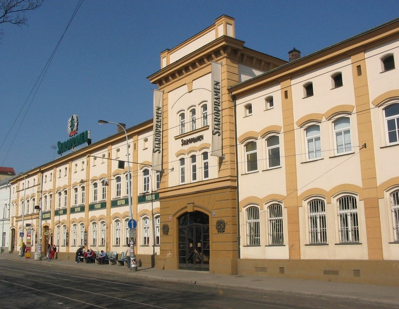 Browar Staropramen przy ulicy Nádražní 84 w praskiej dzielnicy Smichov